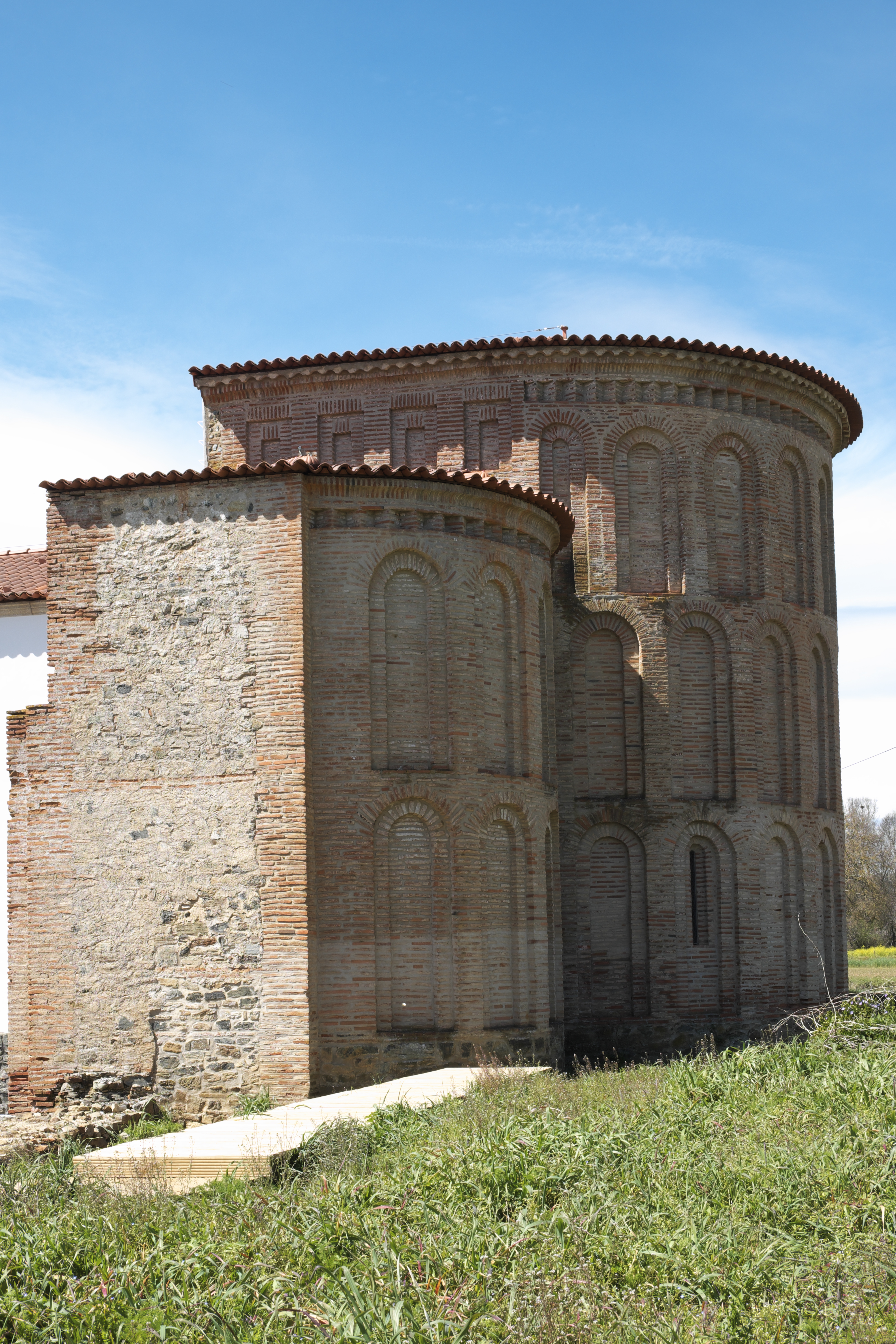 Ehemalige Benediktinerabteikirche in Castro de Avelãs, einer Freguesia von Bragança in der Região Norte (Portugal), Mudéjar-Apsis